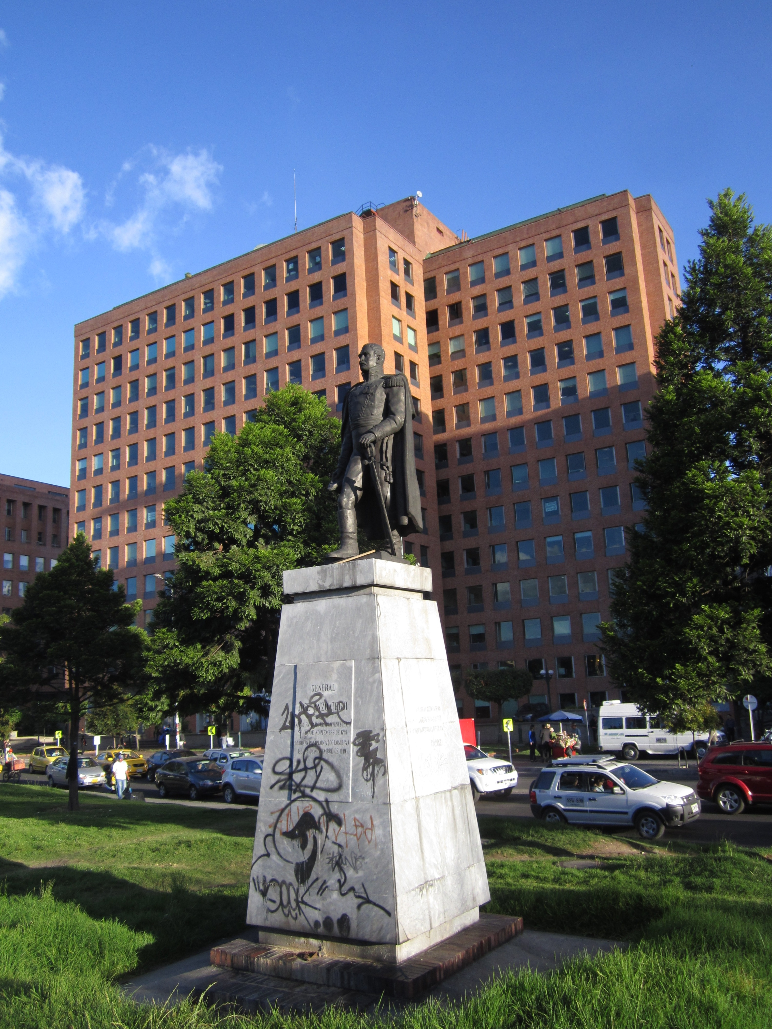 Bogotá Urbanización Pablo VI segunda etapa, entrada edificio.